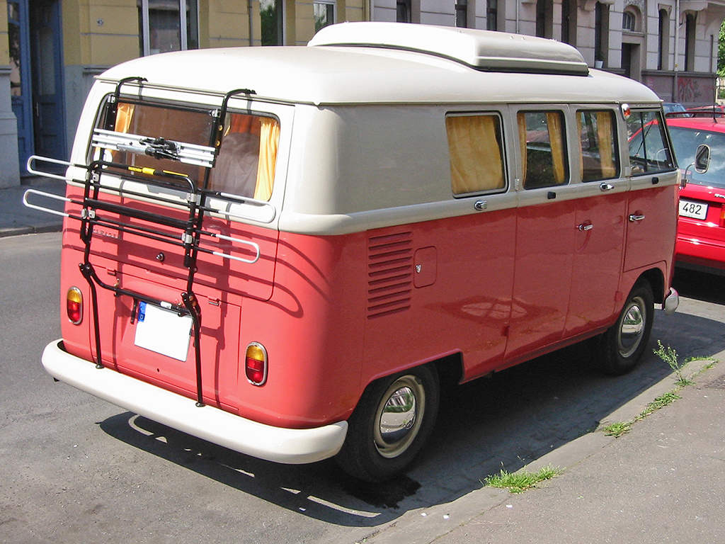 VW Bus T1